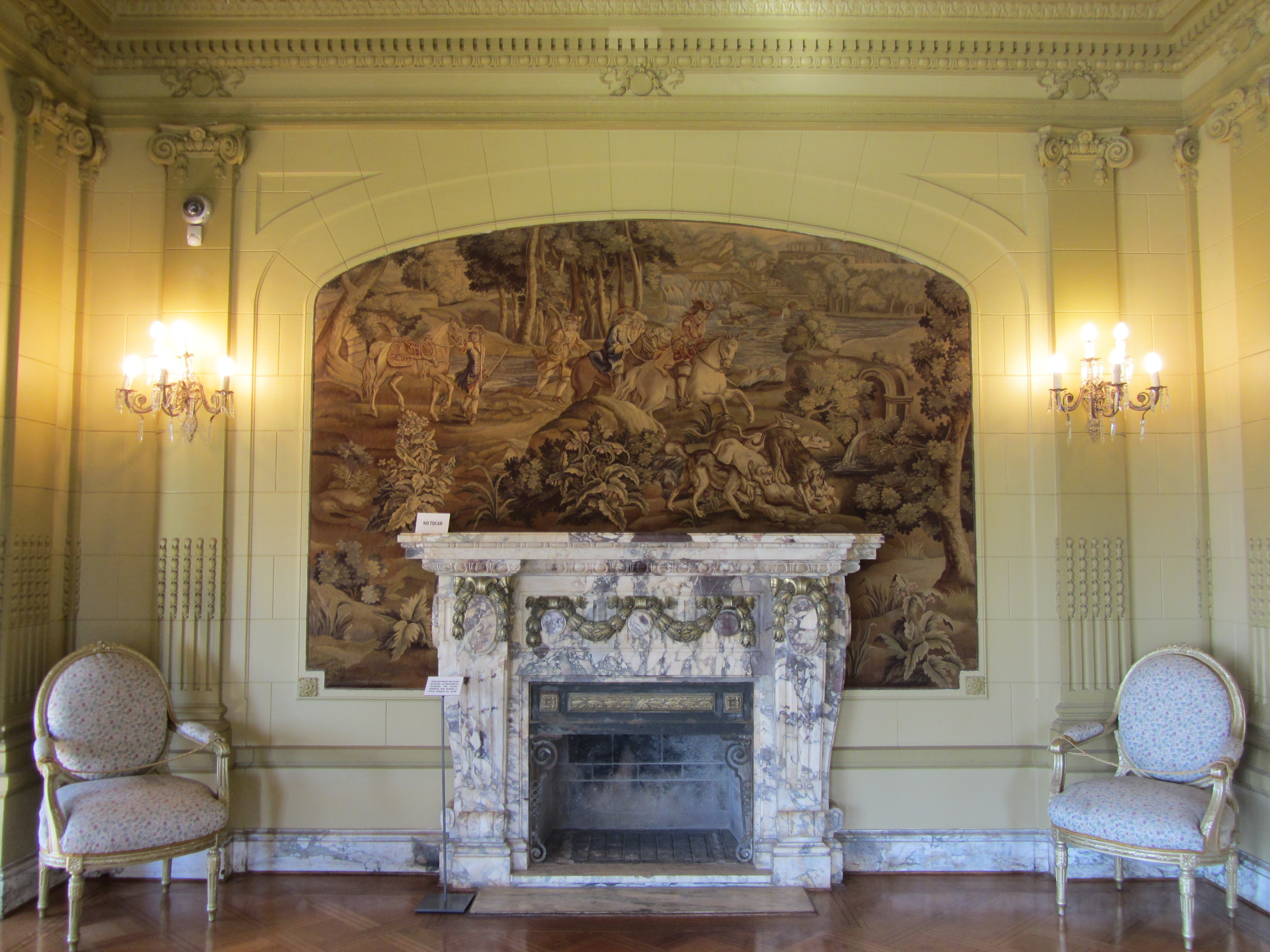 Gobelino francés con escena de cacería encargado por Pascual Baburizza para decorar la nueva chimenea de mármol del salón de su residencia